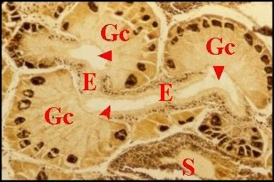 Glande botryoide de Kaira adulte